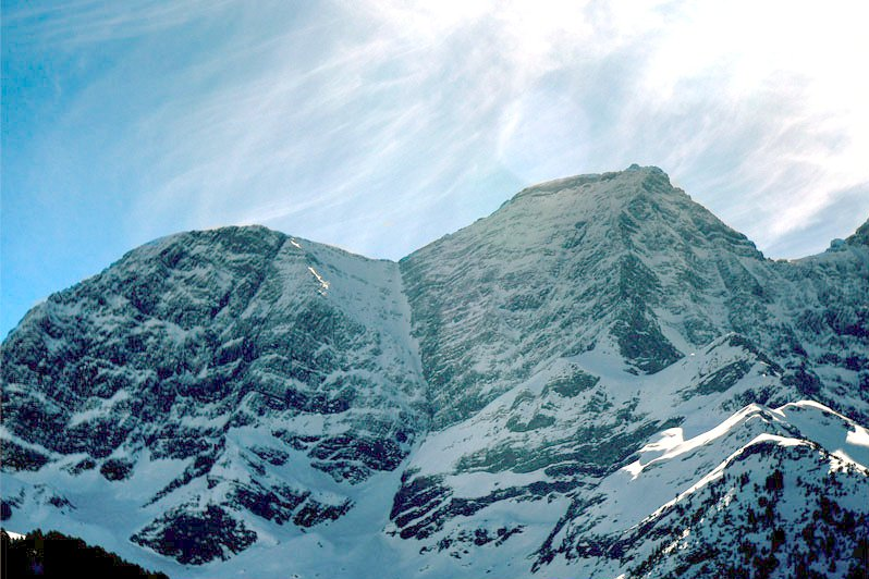 Est du Cirque de gavarnie. De gauche (est) à droite (ouest) : grand Astazou, couloir Swan, et petit Astazou.